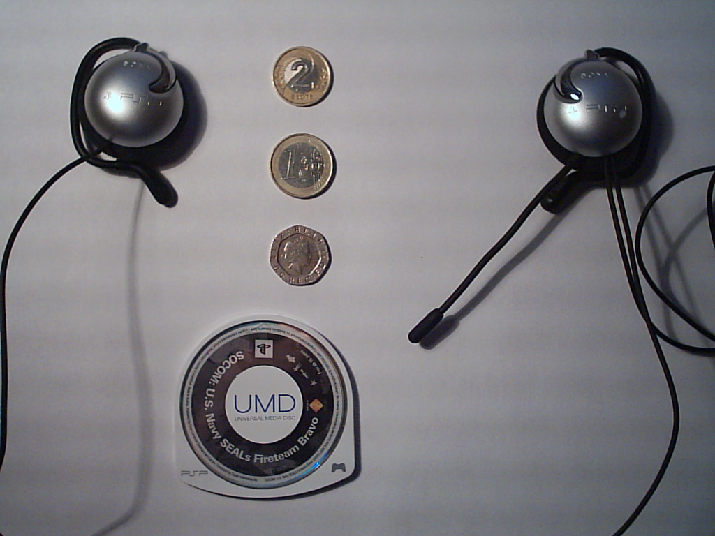 Zdjęcie mikrofonu firmowego Sony do konsoli PlayStation Portable z porównaniem wielkosciowym z monetami : 2 PLN / 1 EUR / 0.20 GBP oraz płyty UMD